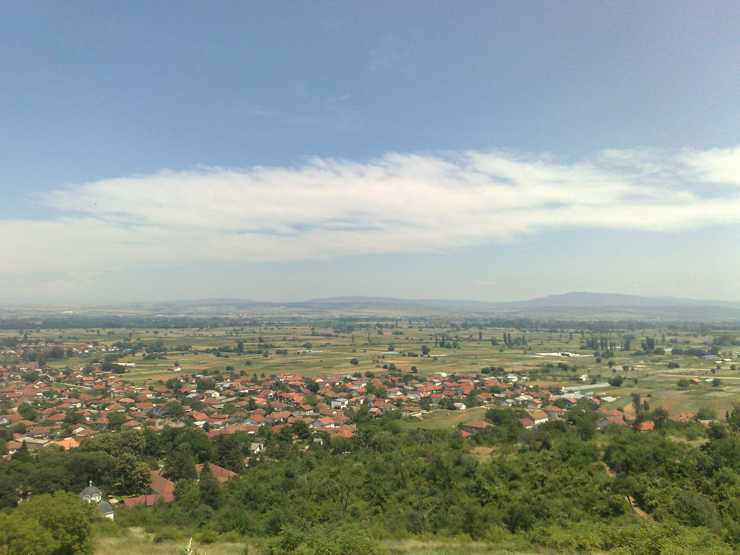 Скопското поле